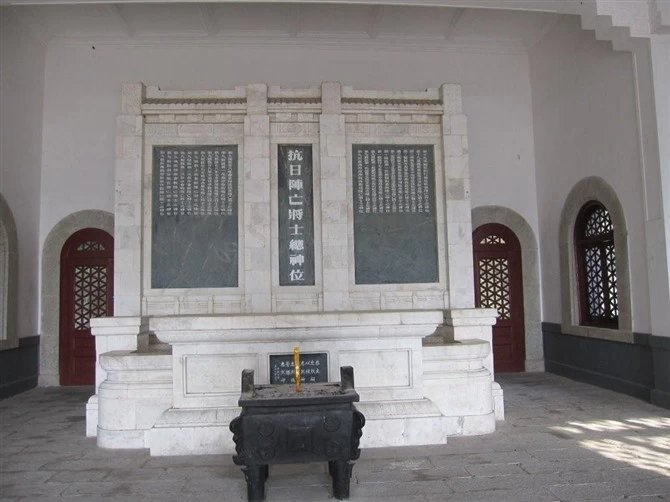 南岳忠烈祠享堂烈士神位